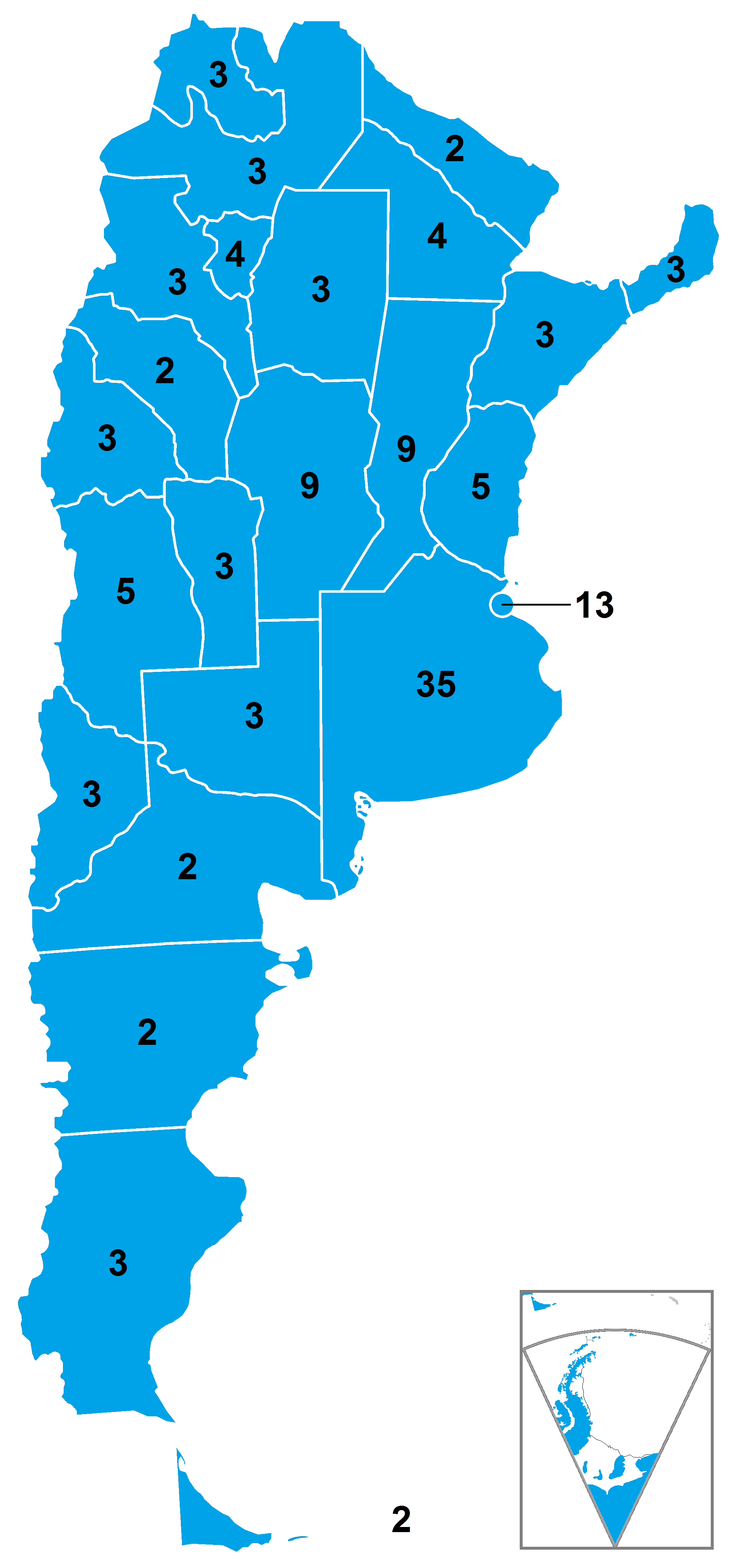 Elecciones legislativas de Argentina de 2017 - Diputados a renovar